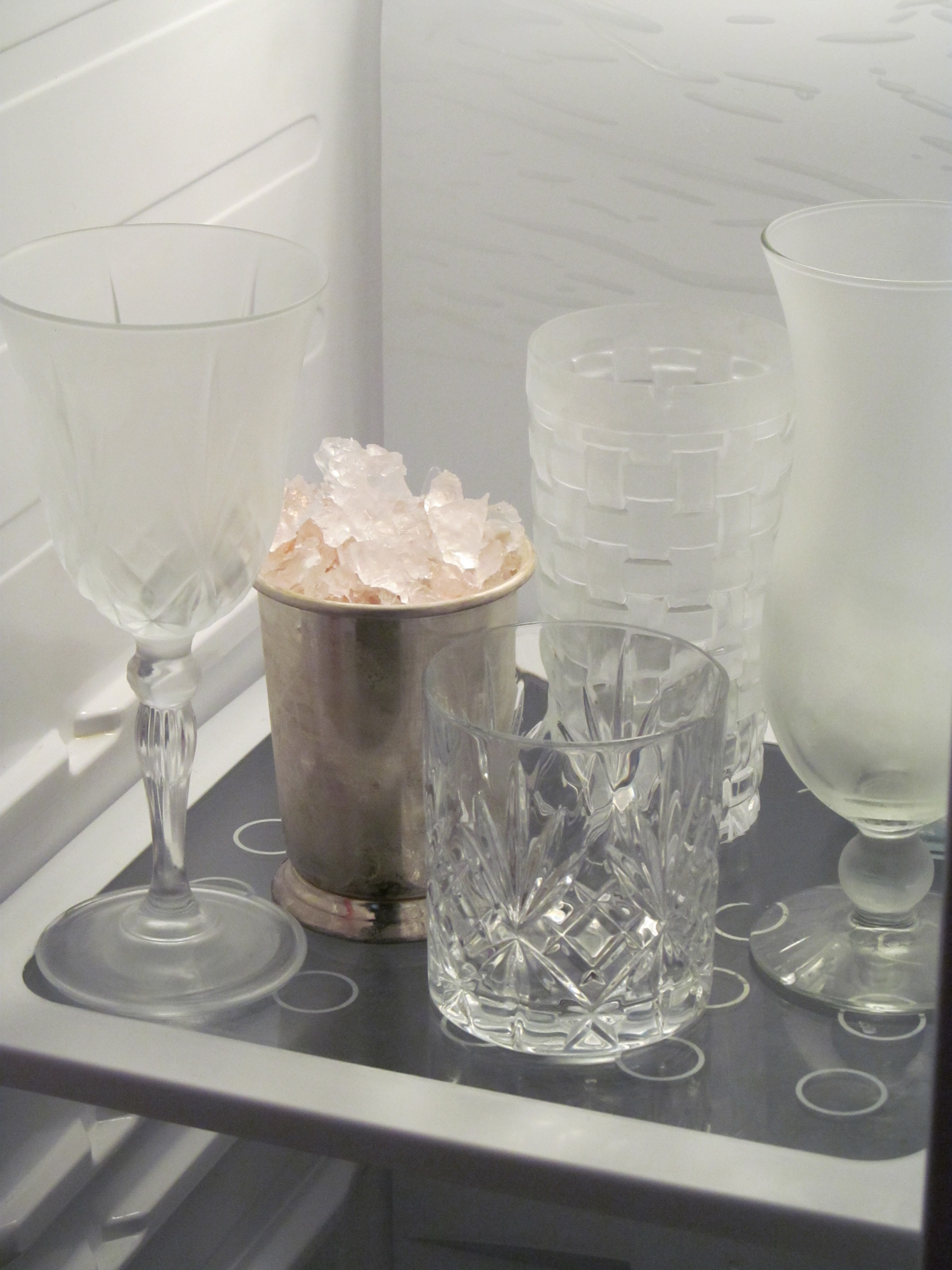 Cocktailgläser werden im Gefrierfach vorgekühlt (gefrostet). Von links nach rechts: Weinkelch, Silberbecher, großes Old-Fashioned-Glas (DOF), Highball- oder Longdrinkglas, Hurricaneglas. Fotoshooting "Wiki loves Cocktails" am 26. September 2015 bei Borco Marken-Import in Hamburg-Bahrenfeld